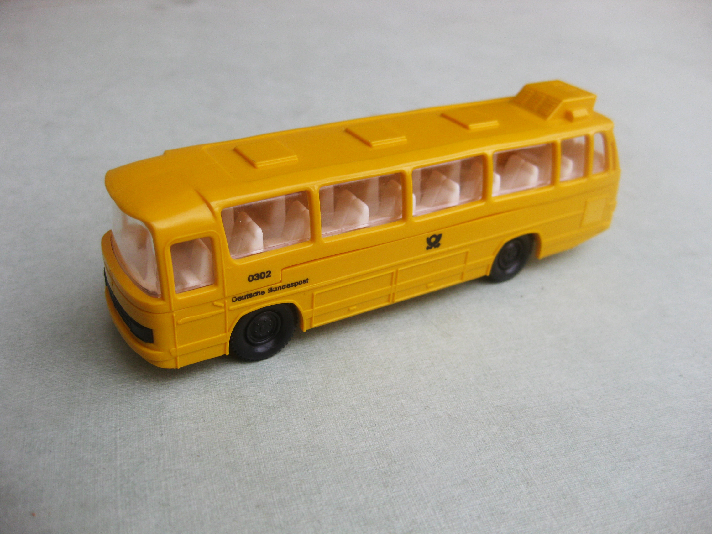 Werbegeschenk der Deutschen Bundespost. Omnibus Mercedes O302 im Maßstab 1:72, hergestellt von Joy-Toy in Griechenland. Das Modell "Nr. 51" wurde in Griechenland als Spielzeug verkauft, im Ausland als Werbegeschenk mit Wunschaufdruck. Der damals für Spielzeug unübliche Maßstab 1:72 wurde gewählt, um auch eine Verwendung in Modellbahnanlagen zu ermöglichen